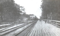 Платформа станции Химки (ок. 1900)